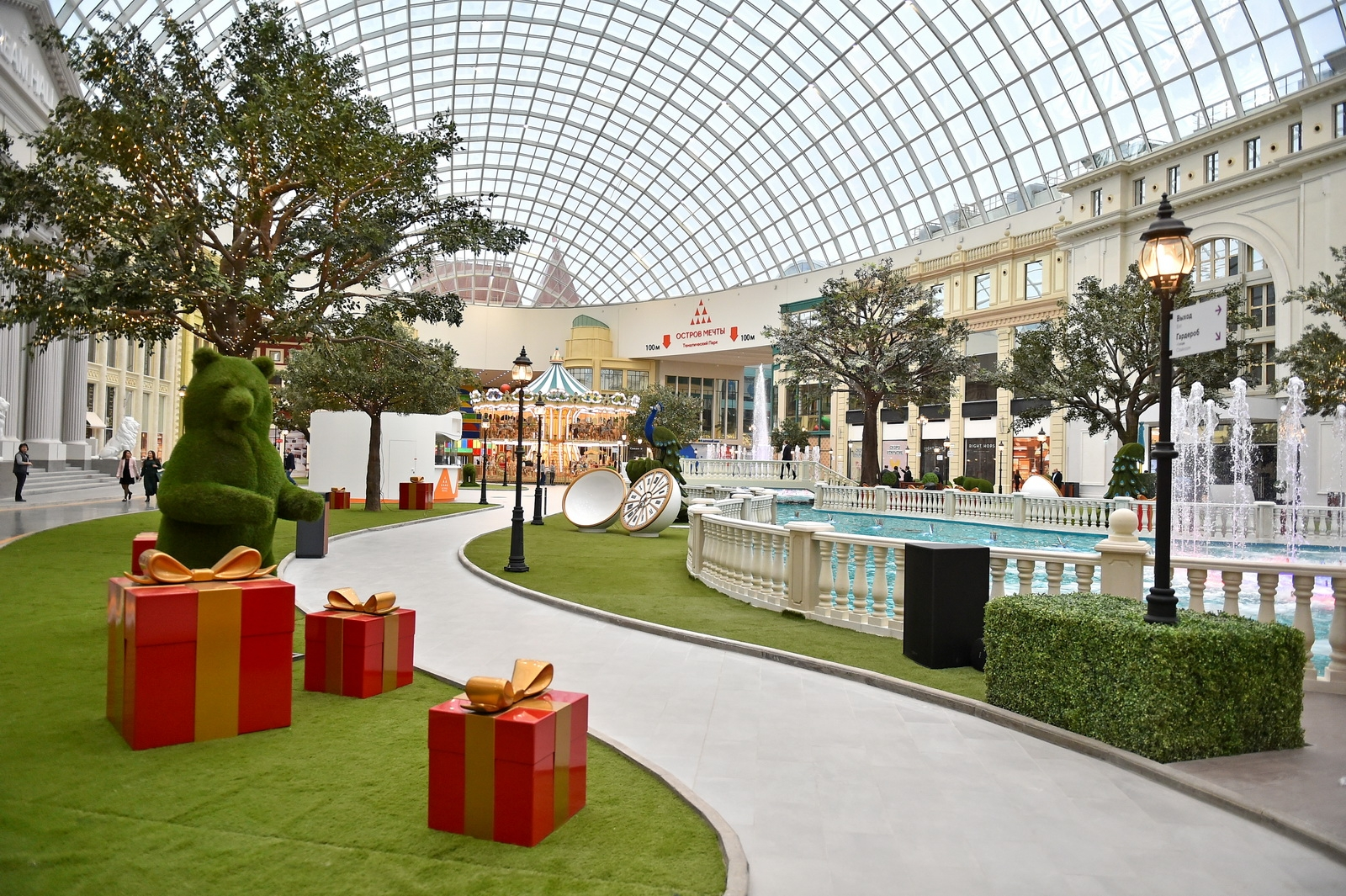 Владимир Путин и Сергей Собянин посетили новый парк развлечений «Остров Мечты»